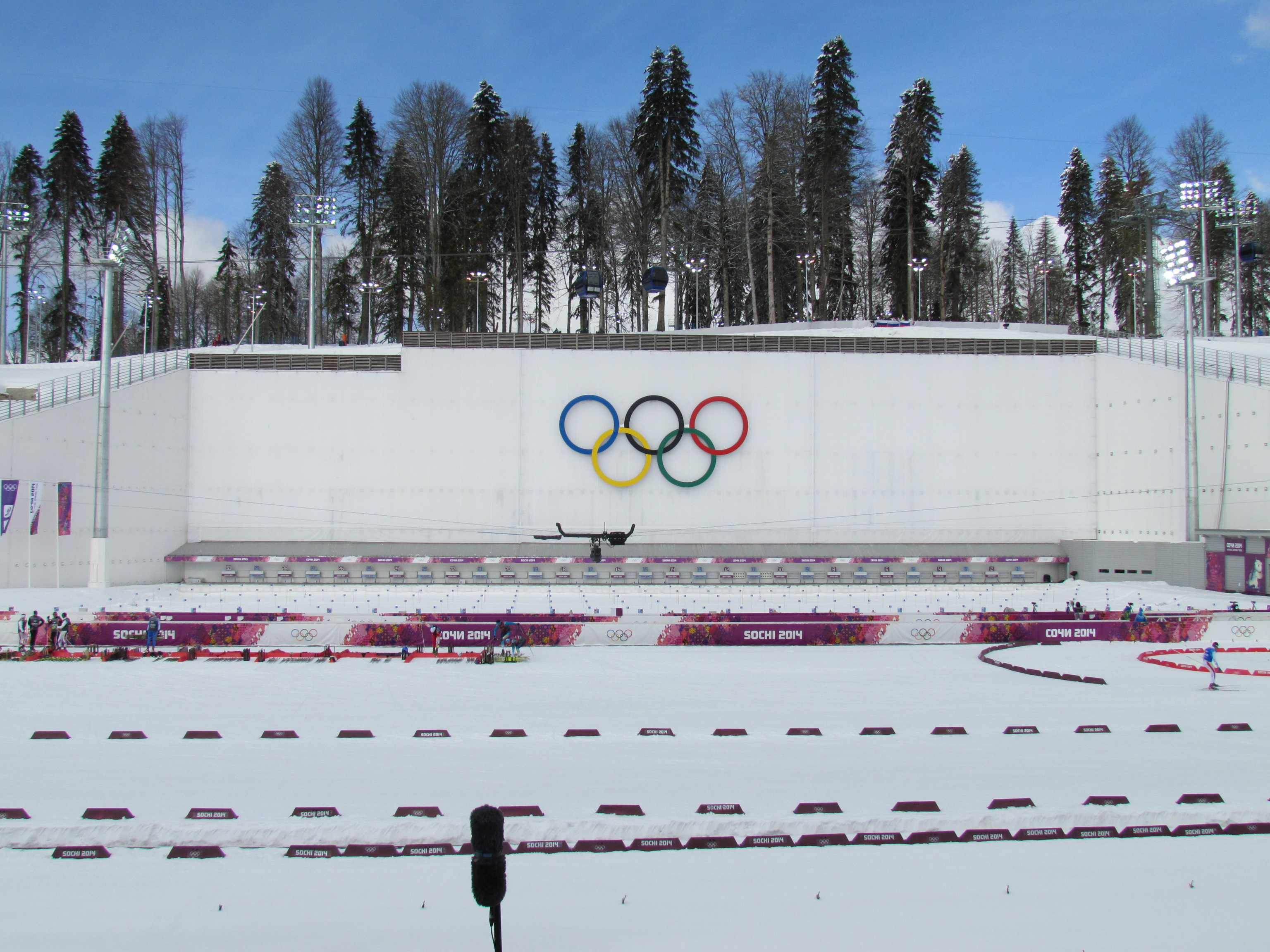 Лижно-біатлонний комплекс «Лаура» (смт Красна Поляна, Сочі, Краснодарський край) під час Олімпійських ігор